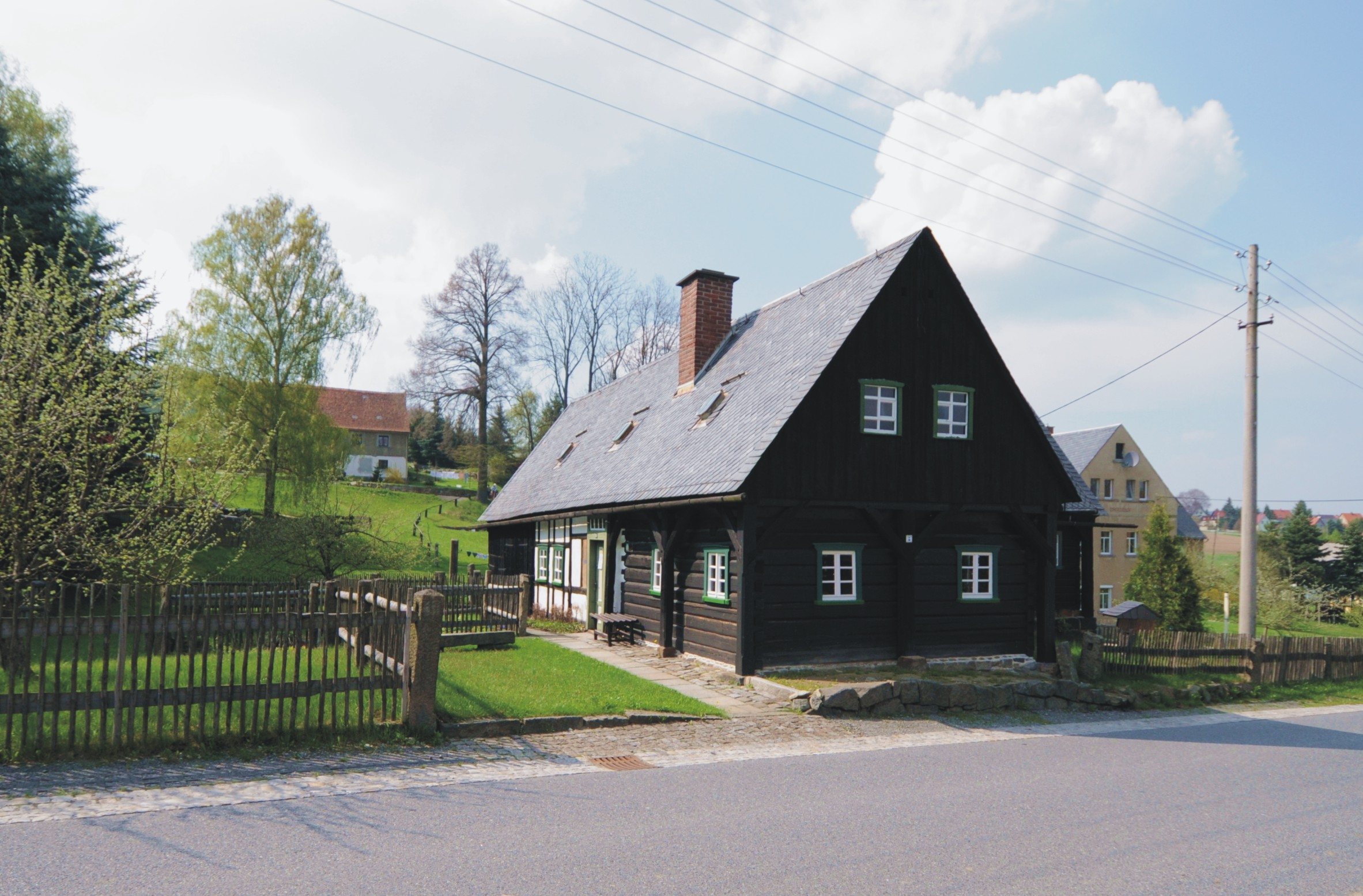 Heimatmuseum in Sohland / Spree (Sachsen, Deutschland)